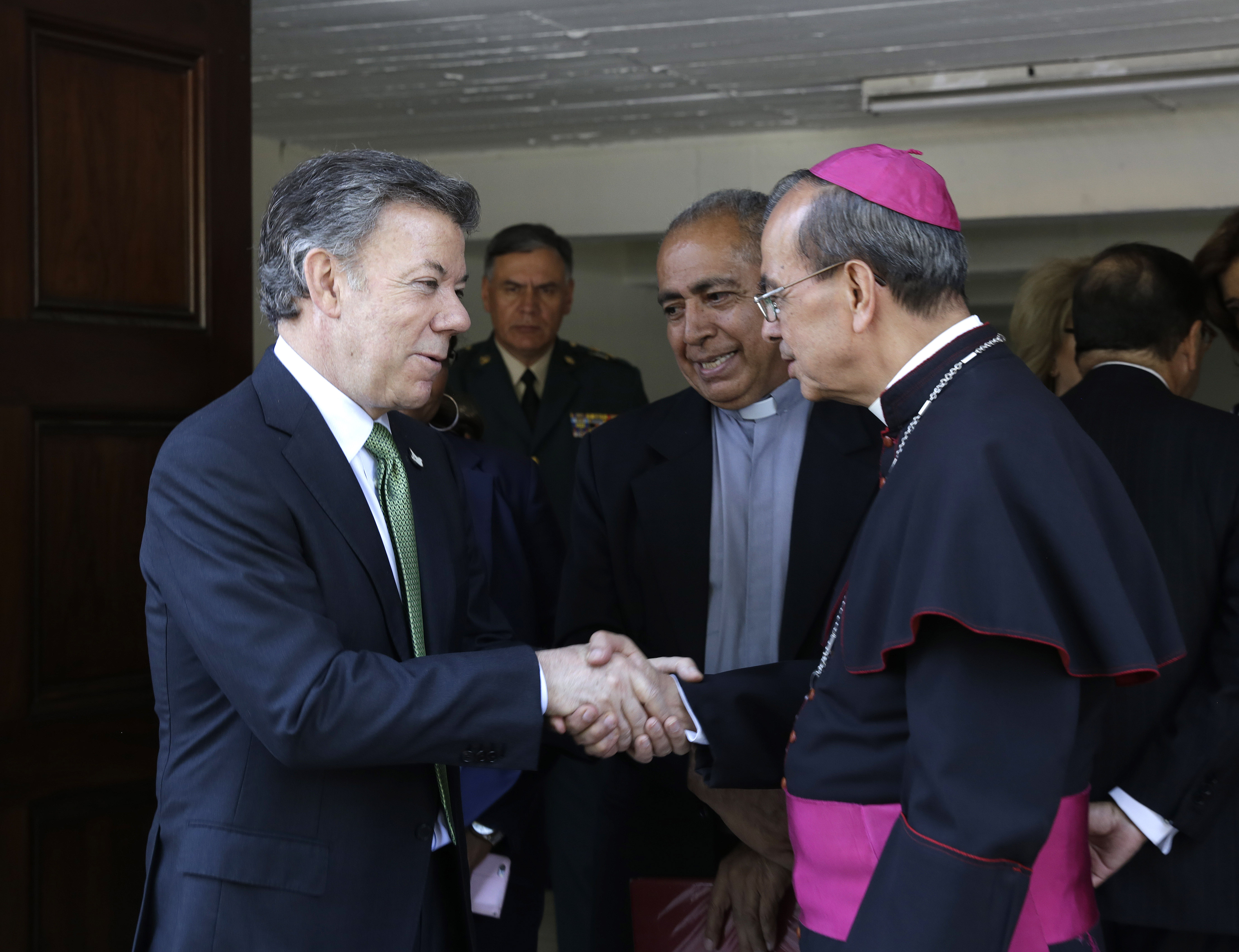 Presidente de Colombia , Juan Manuel Santos saluda a autoridades de la Iglesia católica.